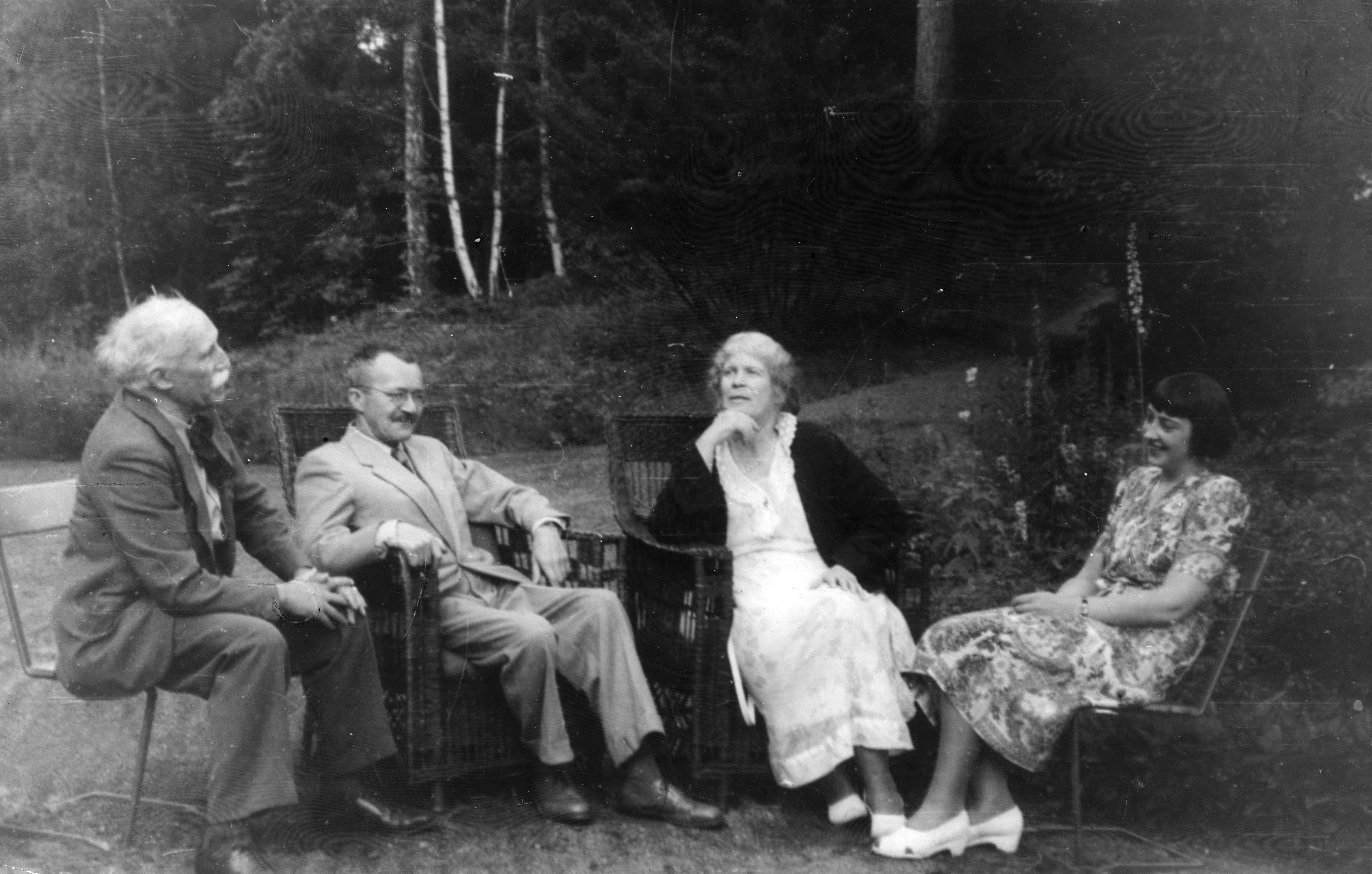 Bildet er hentet fra Nasjonalbibliotekets bildesamling. Anmerkninger til bildet var: Postkortet har tilhørt Bjørn Bjørnson (1899-1986). Depicted person: Øverland, Arnulf Depicted person: Posse-Brazdova, Amelie Depicted person: Bjerre, Poul Carl